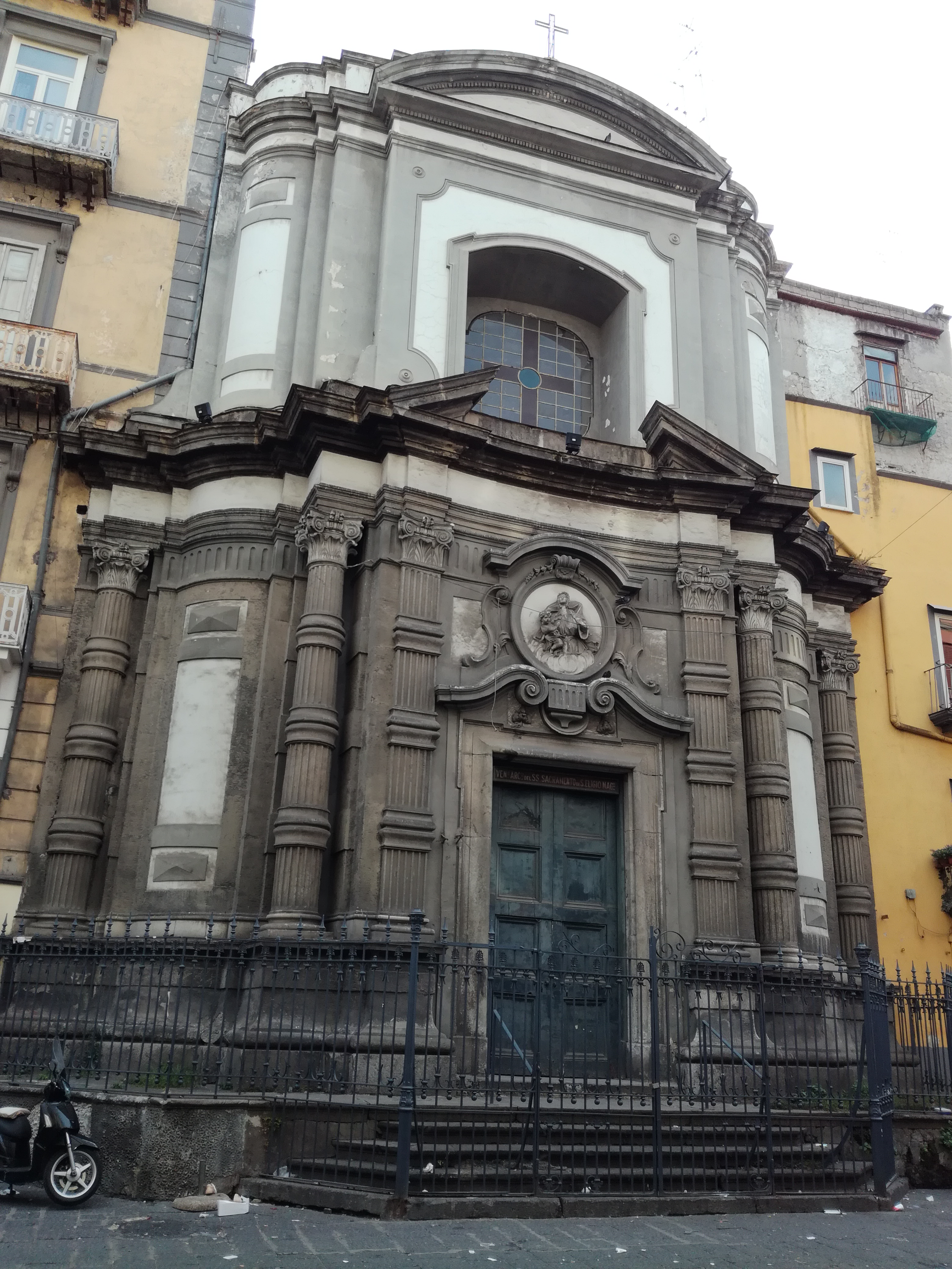 Facciata da destra; Missione dei Vergini